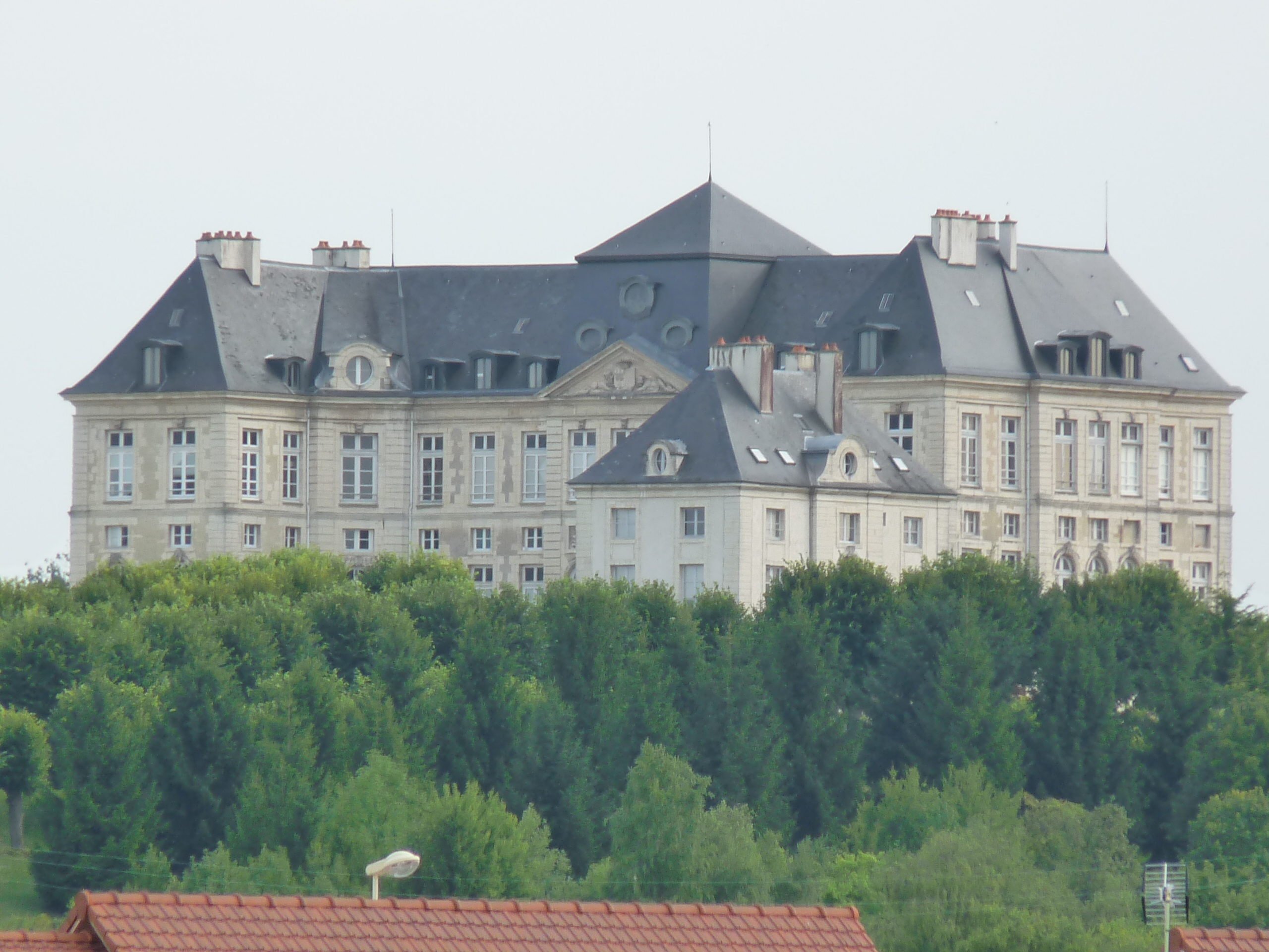 Schloss Brienne, Frankreich, über den Dächern des Ortes